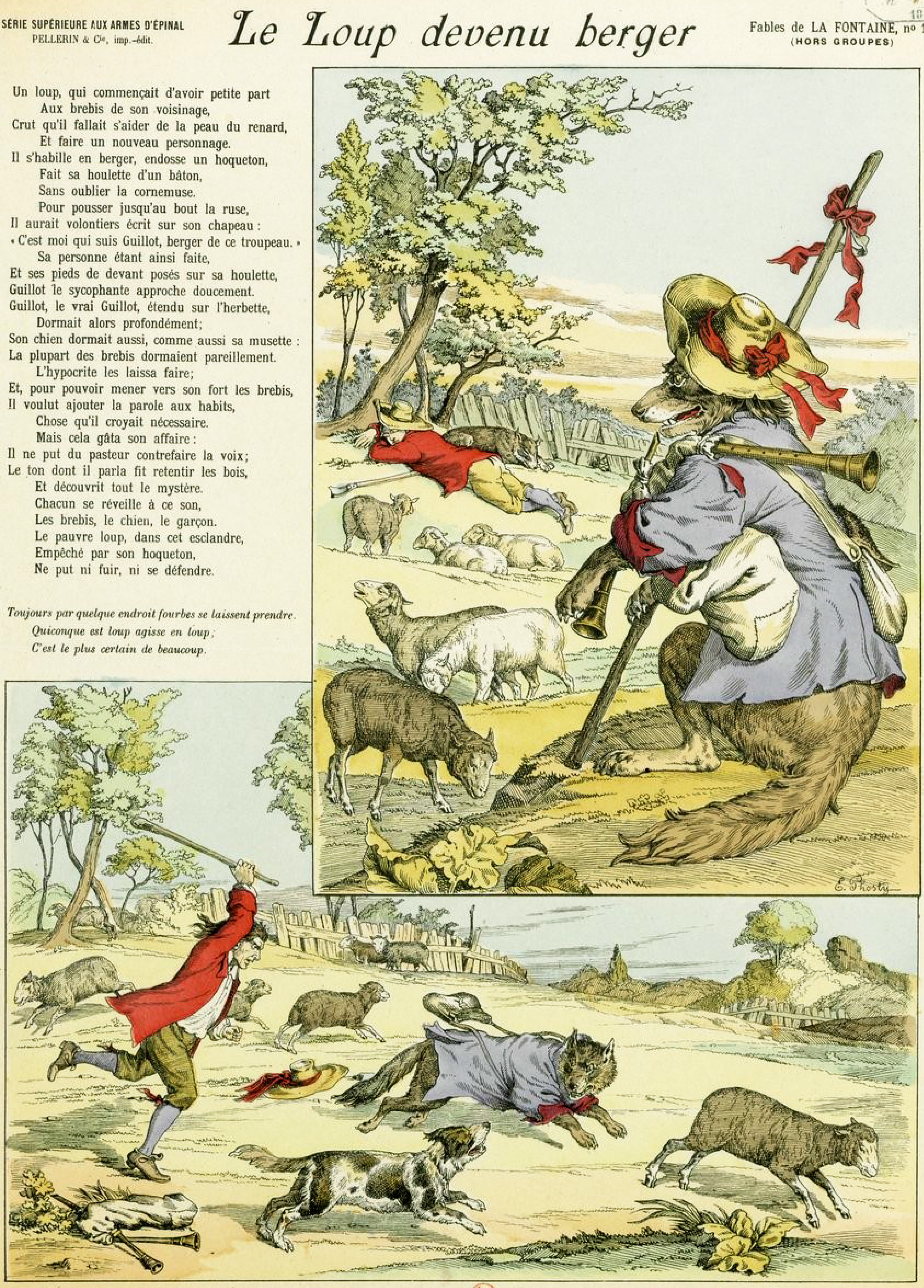 Estampe réalisée par E. Phosty représentant la fable Le Loup devenu berger de Jean de La Fontaine (Epinal, édition Pellerin & Cie, 1895).